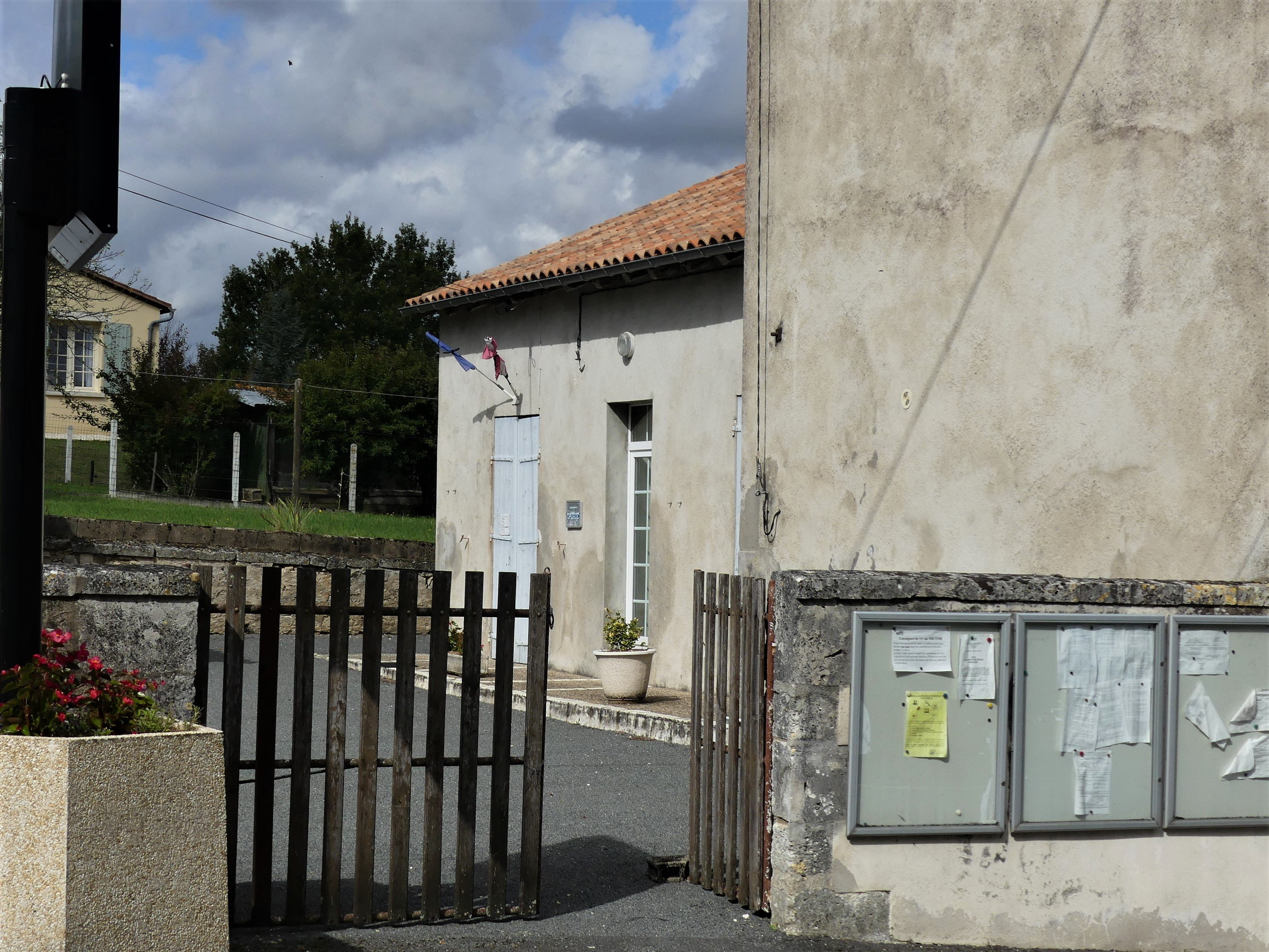 La mairie déléguée de Saint-Sulpice-de-Mareuil, commune nouvelle de Mareuil en Périgord, Dordogne, France.